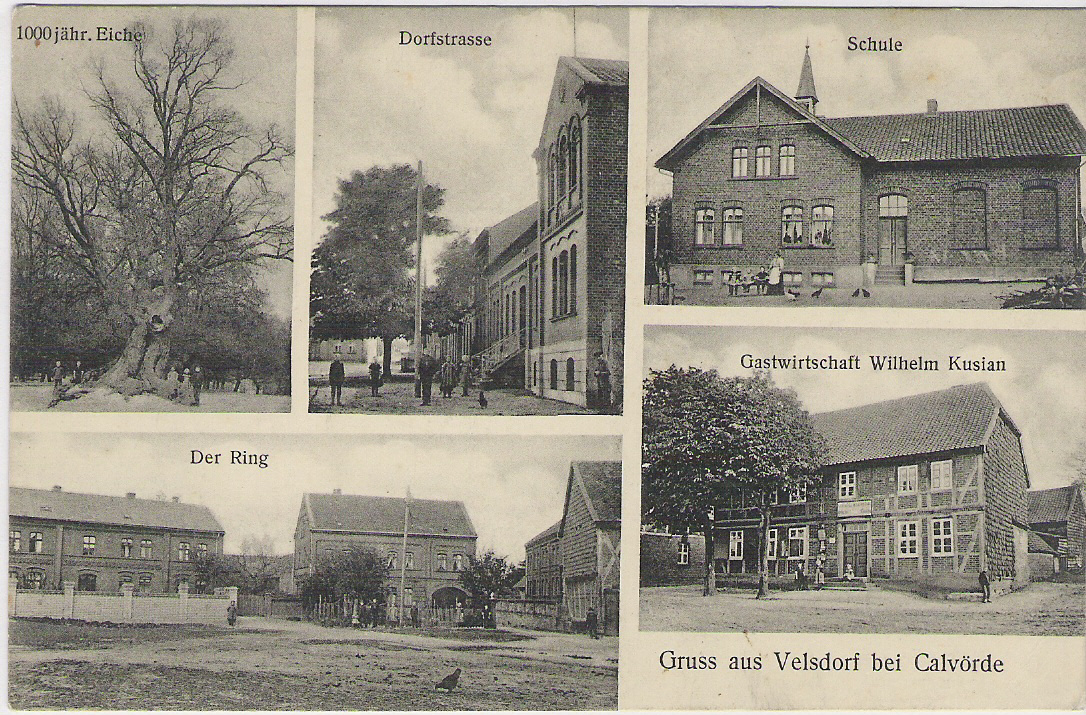 Postkarte aus Velsdorf gestempelt 1917